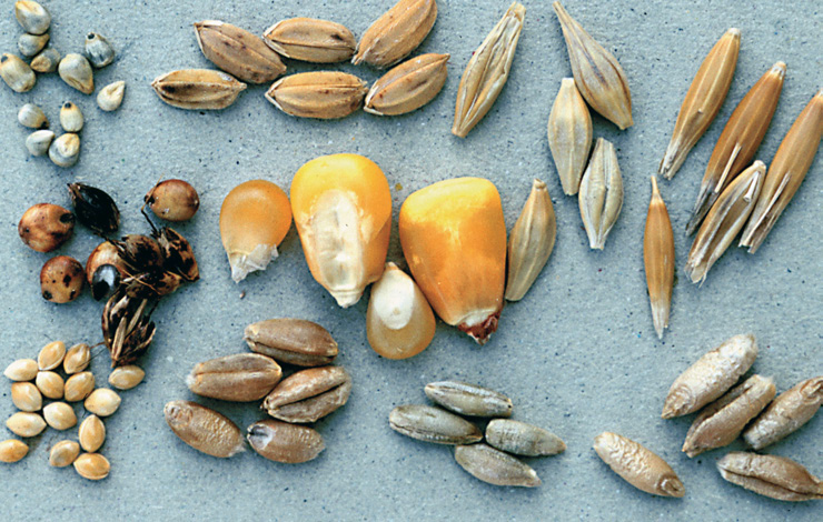 D'esquerra a dreta i de dalt a baix: panís negre, arròs, ordi; sorgo, blat de moro, civada; mill, blat, sègol, triticale.